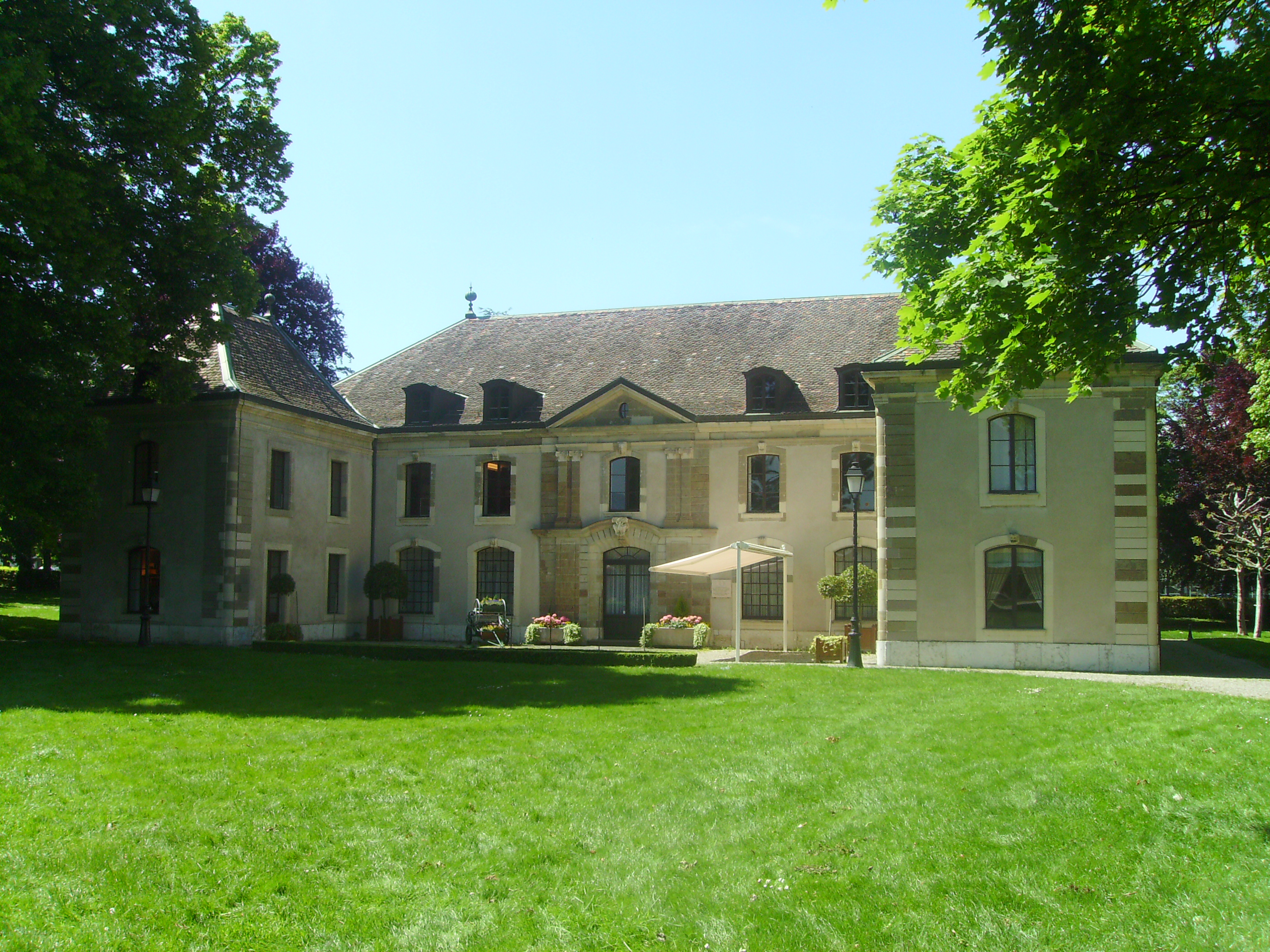 Maison Naville - Mairie de Vernier